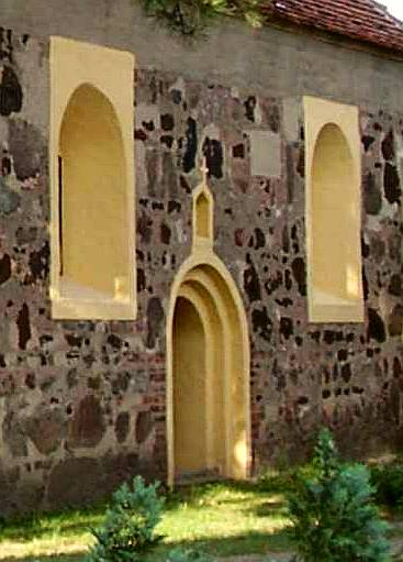 Kirche in Schilda (Church of Schilda)